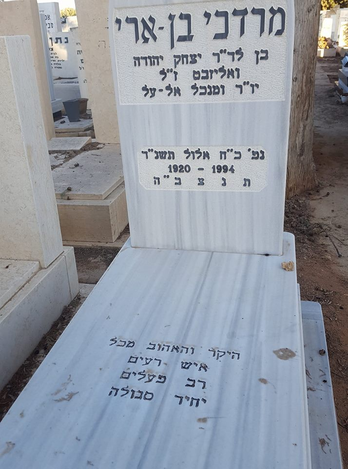 קברו של מרדכי בן ארי שהיה מנכ"ל חברת אל-על, בבית העלמין בקריית שאול בצח אביב